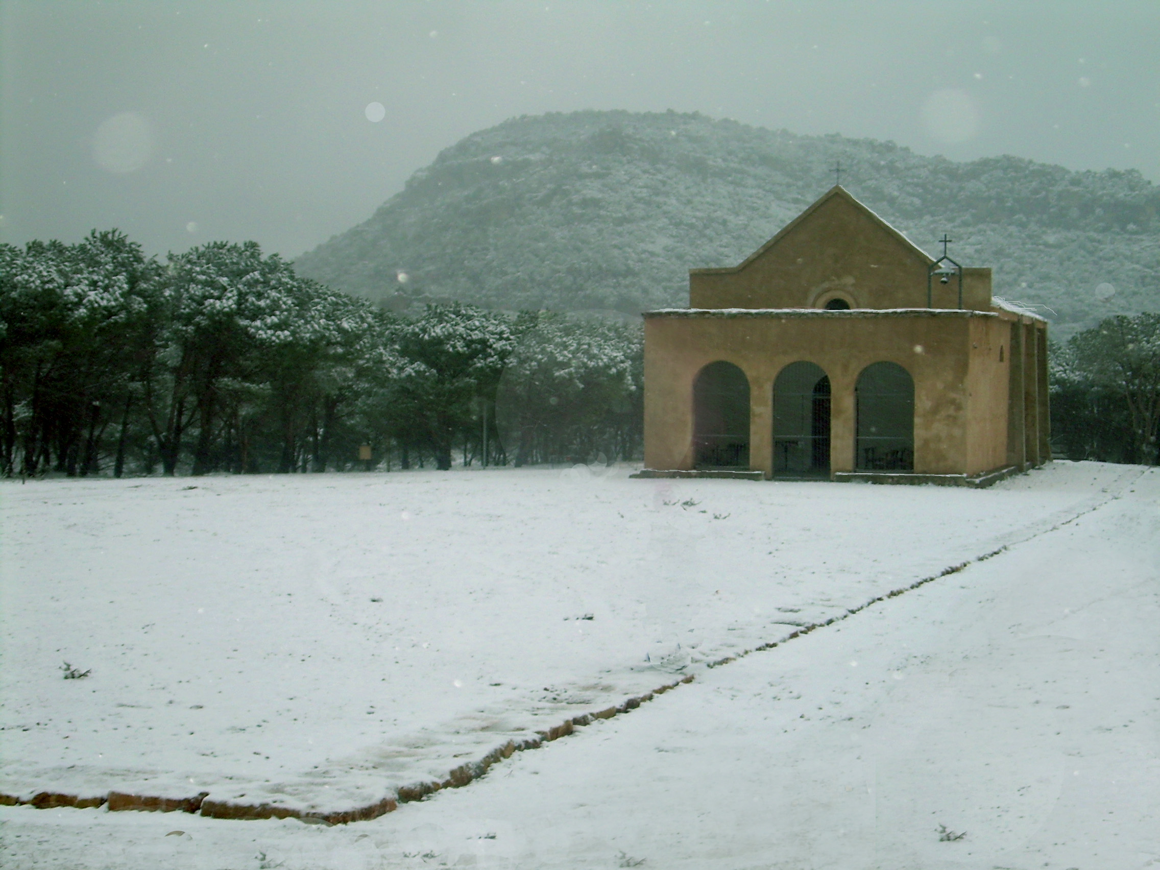 La chiesa campestre di Sant'Antonio sotto una fitta nevicata nel dicembre 2007